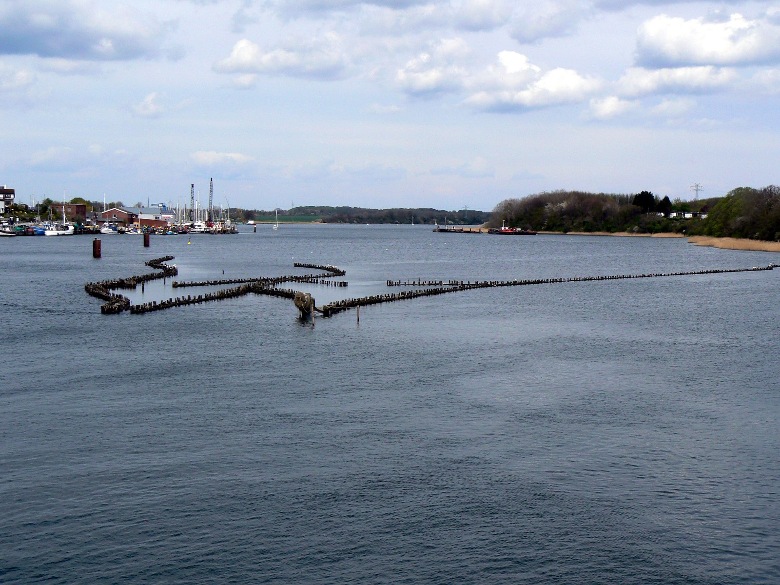 Heringszaun (fest verankertes Reusensystem) in der Schlei bei Kappeln. Letzter intakter Heringszaun in der Schlei von 38 Zäunen (um 1600, alte Bezeichnung: Hamentünen).